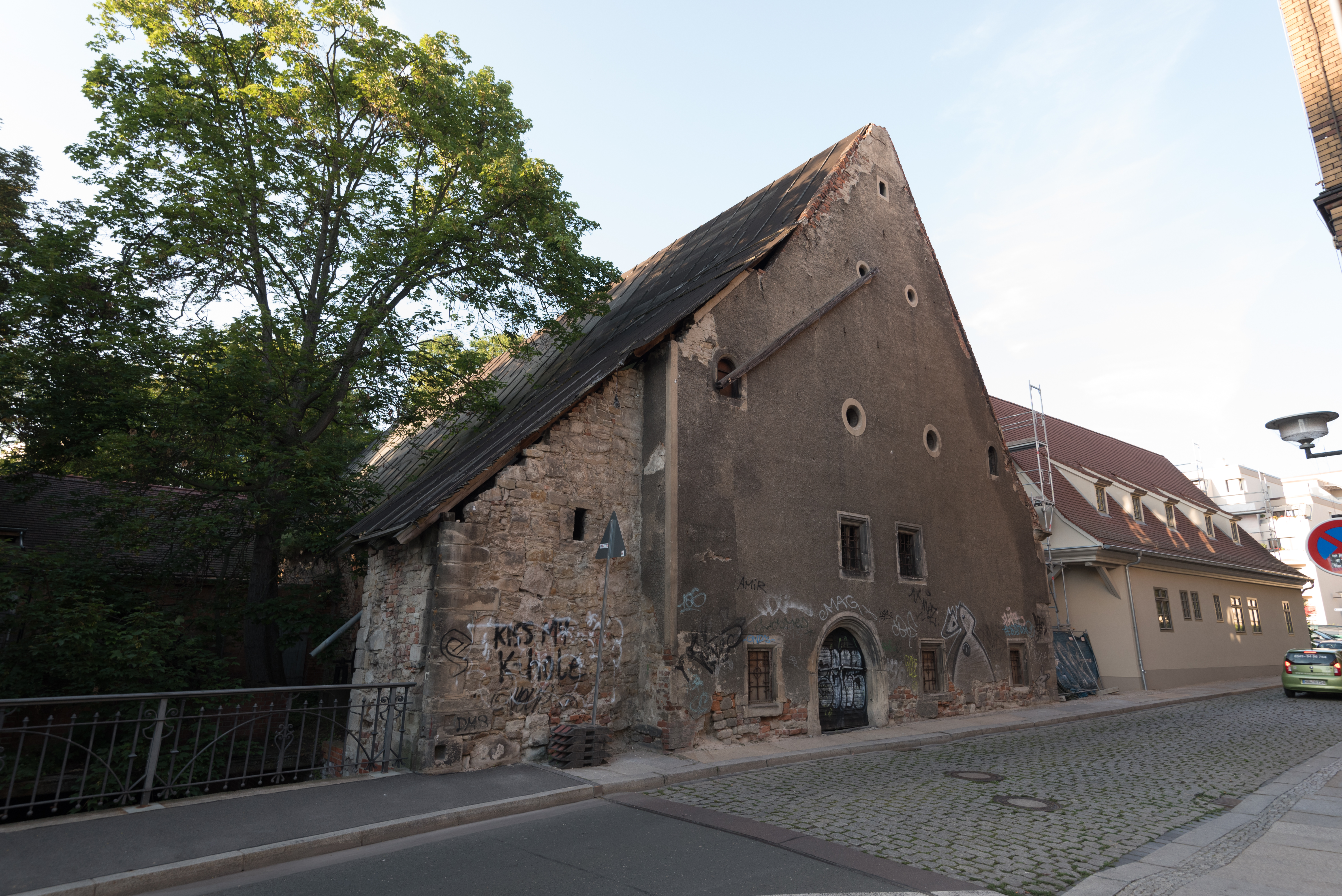 Halle (Saale), Schlossberg 1, Neumühle